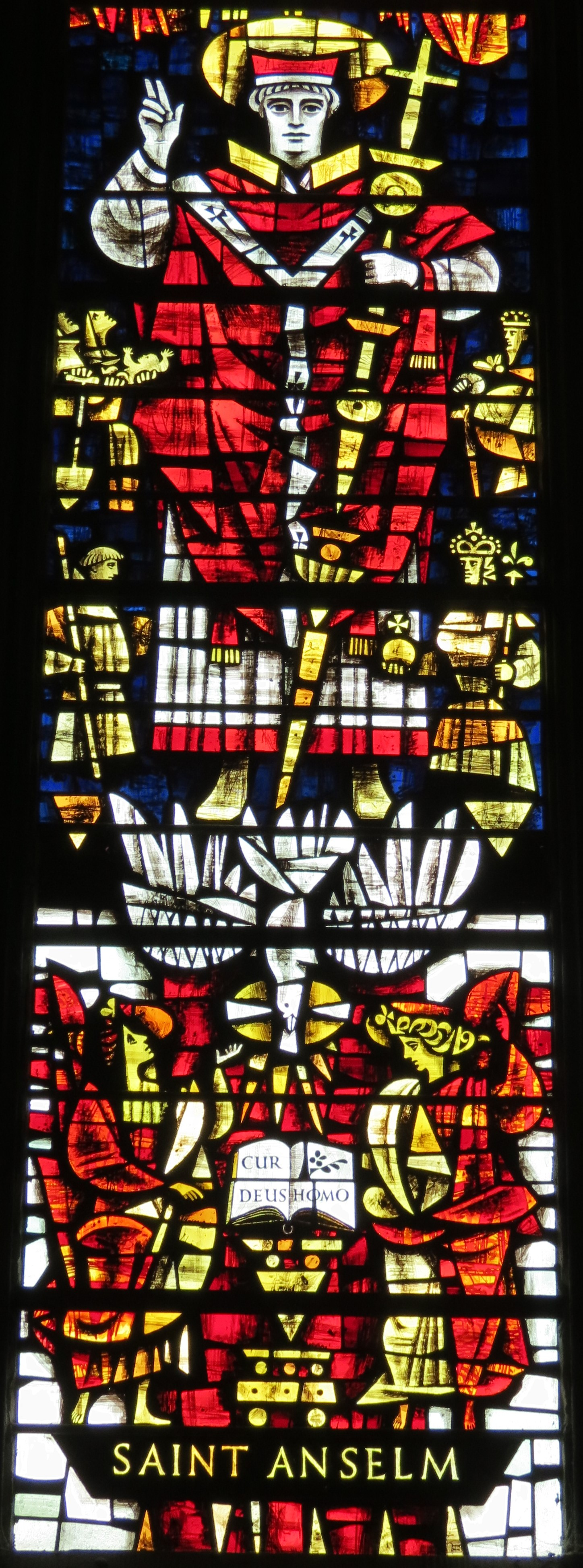 Anselme sur un vitrail de la cathédrale de Cantorbéry.